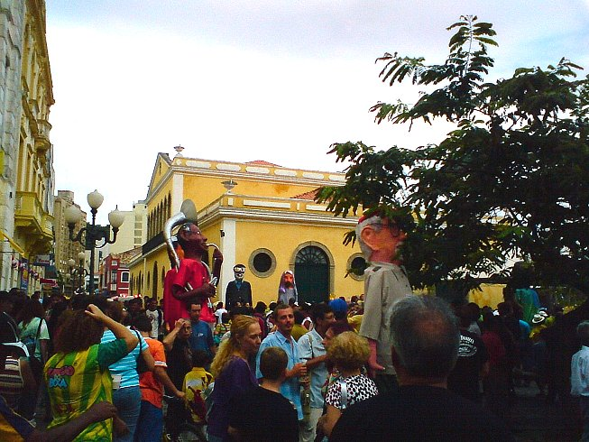 Foto do bloco que abre o carnaval de Florianópolis, o Berbigão do Boca.